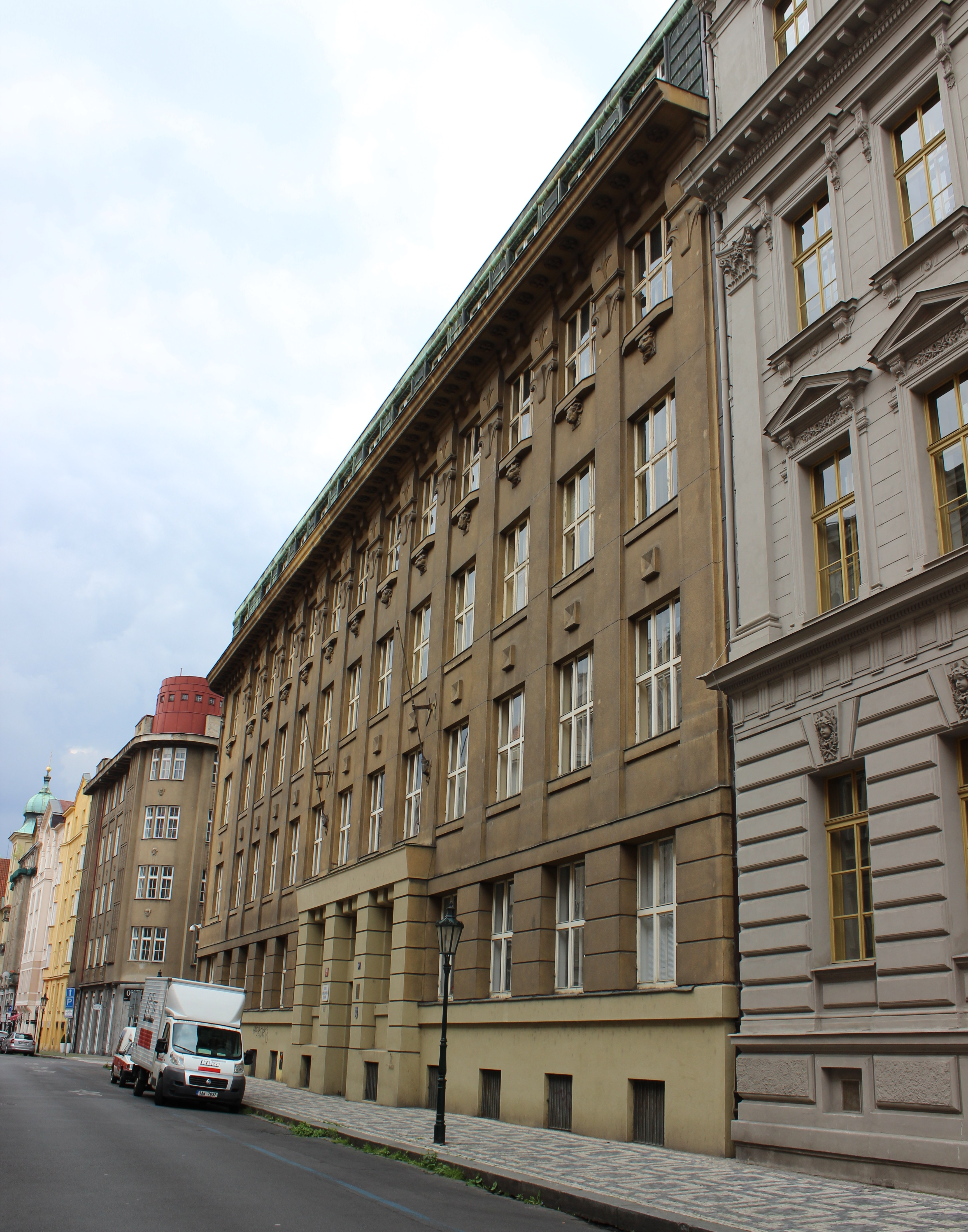 Pohled od severovýchodu na dům číslo 900/17 v pražské Dušní ulici.